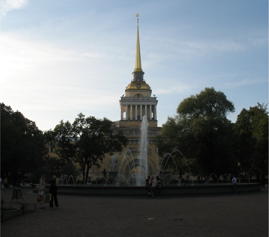 Admiralteistvo, Saint-Petersburg, Russia.